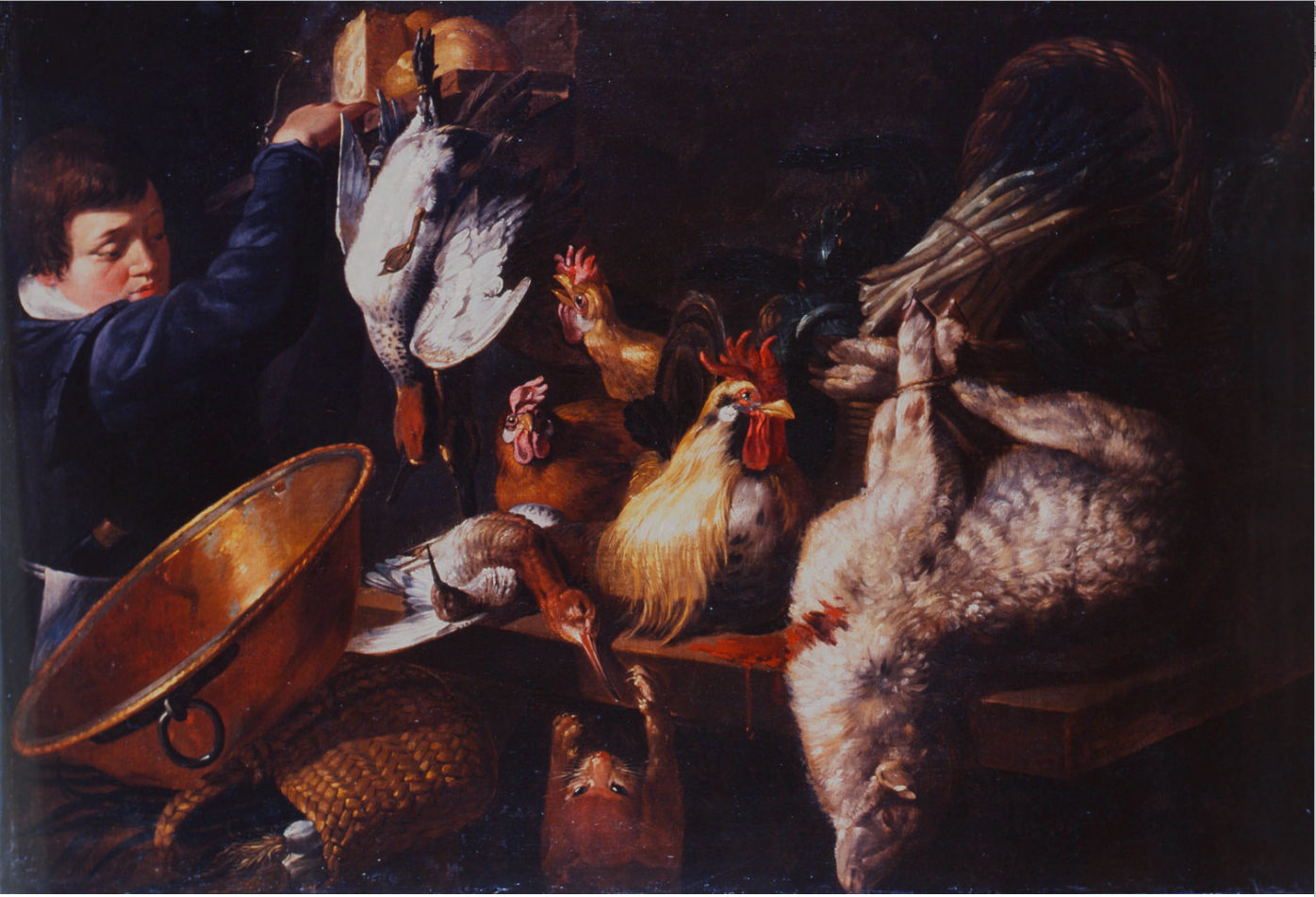 Young man in a pantry